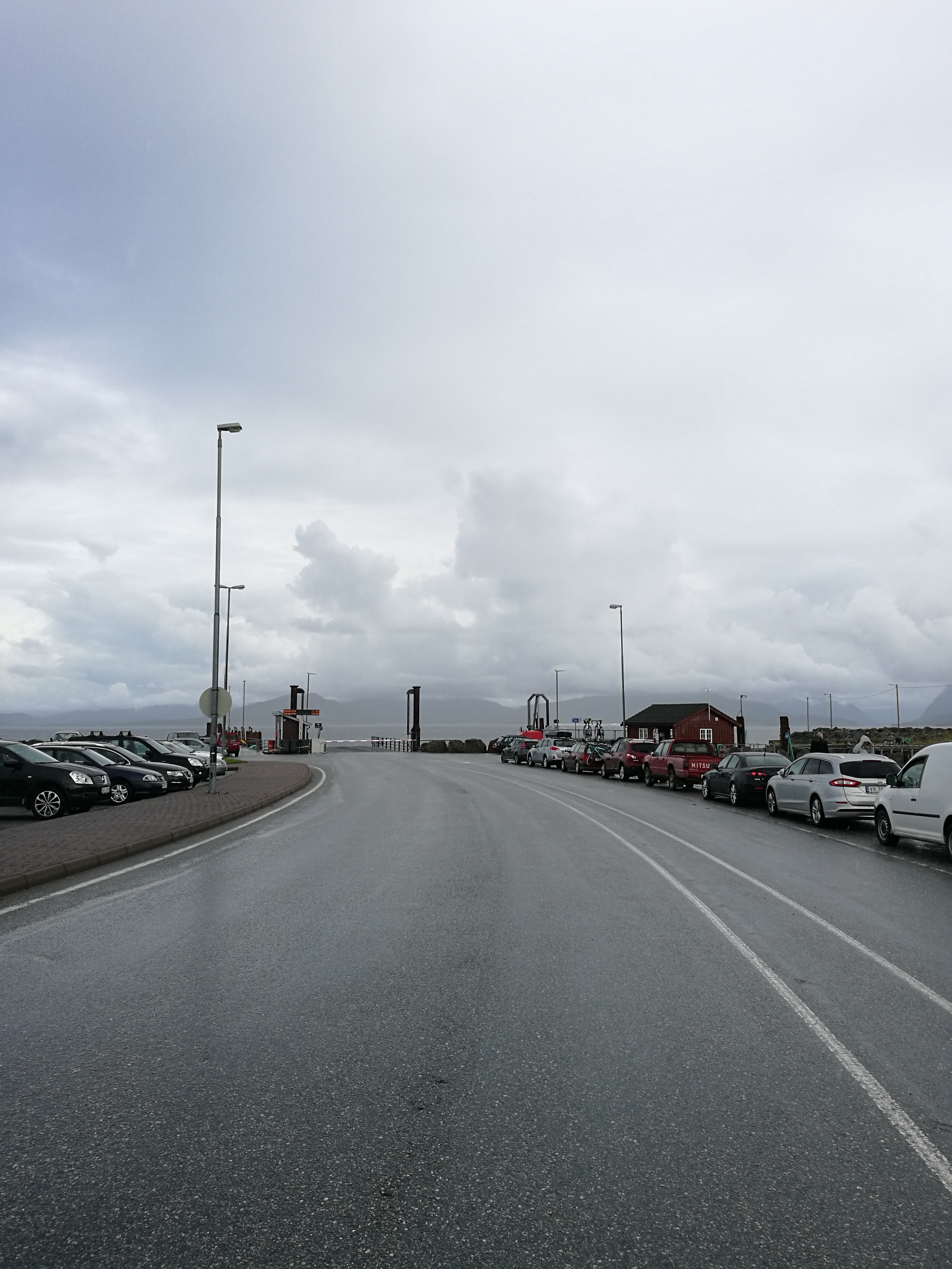 Edøya ferjekai på Edøya sør for Smøla på sambandet Edøya–Sandvika på Fylkesvei 669.